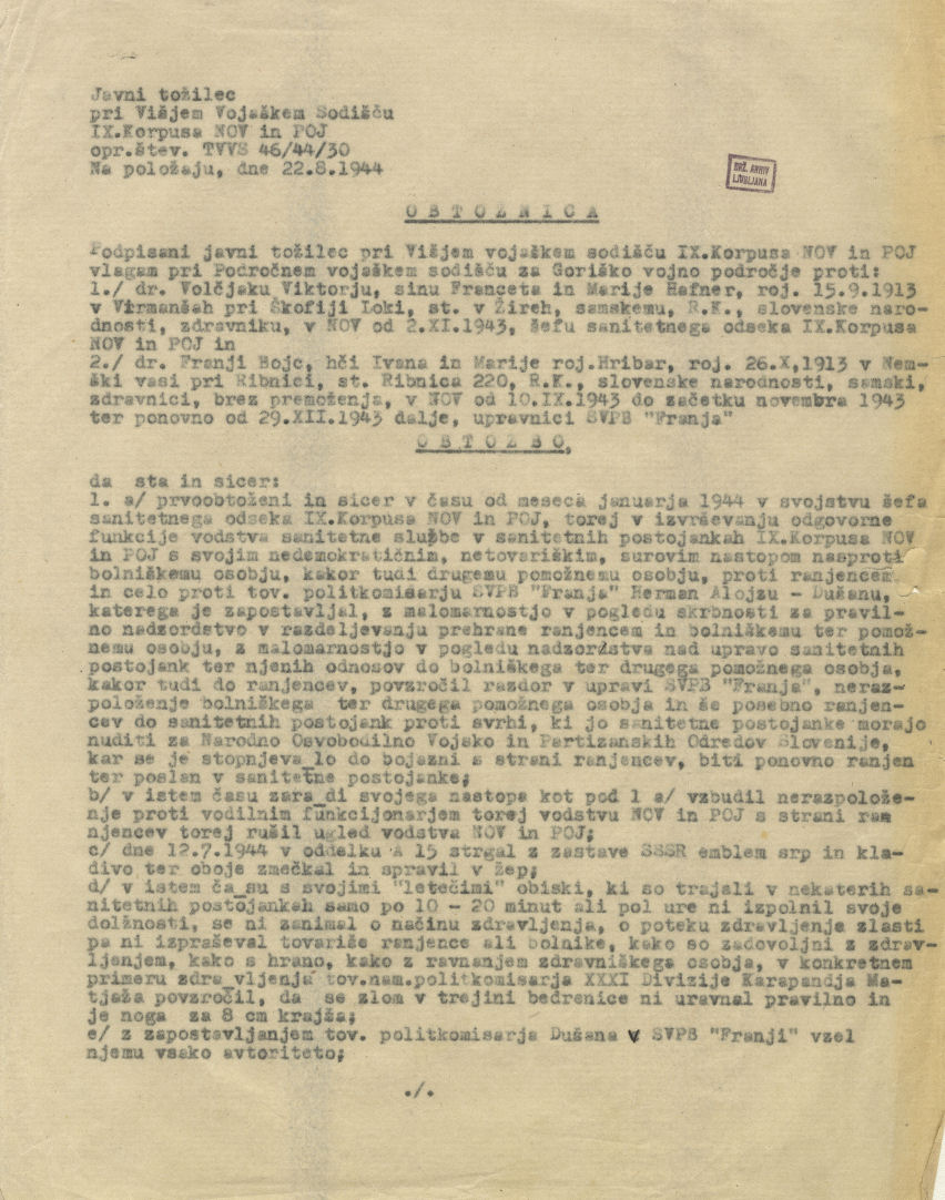 Obtožnica javnega tožilca pri Višjem vojaškem sodišču 9. korpusa NOV in POJ proti Viktorju Volčjaku in Franji Bojc.